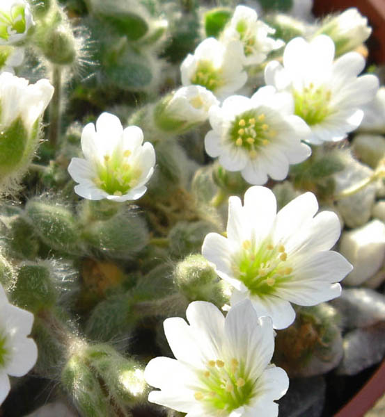 Cerastium alpinum var. nevadense